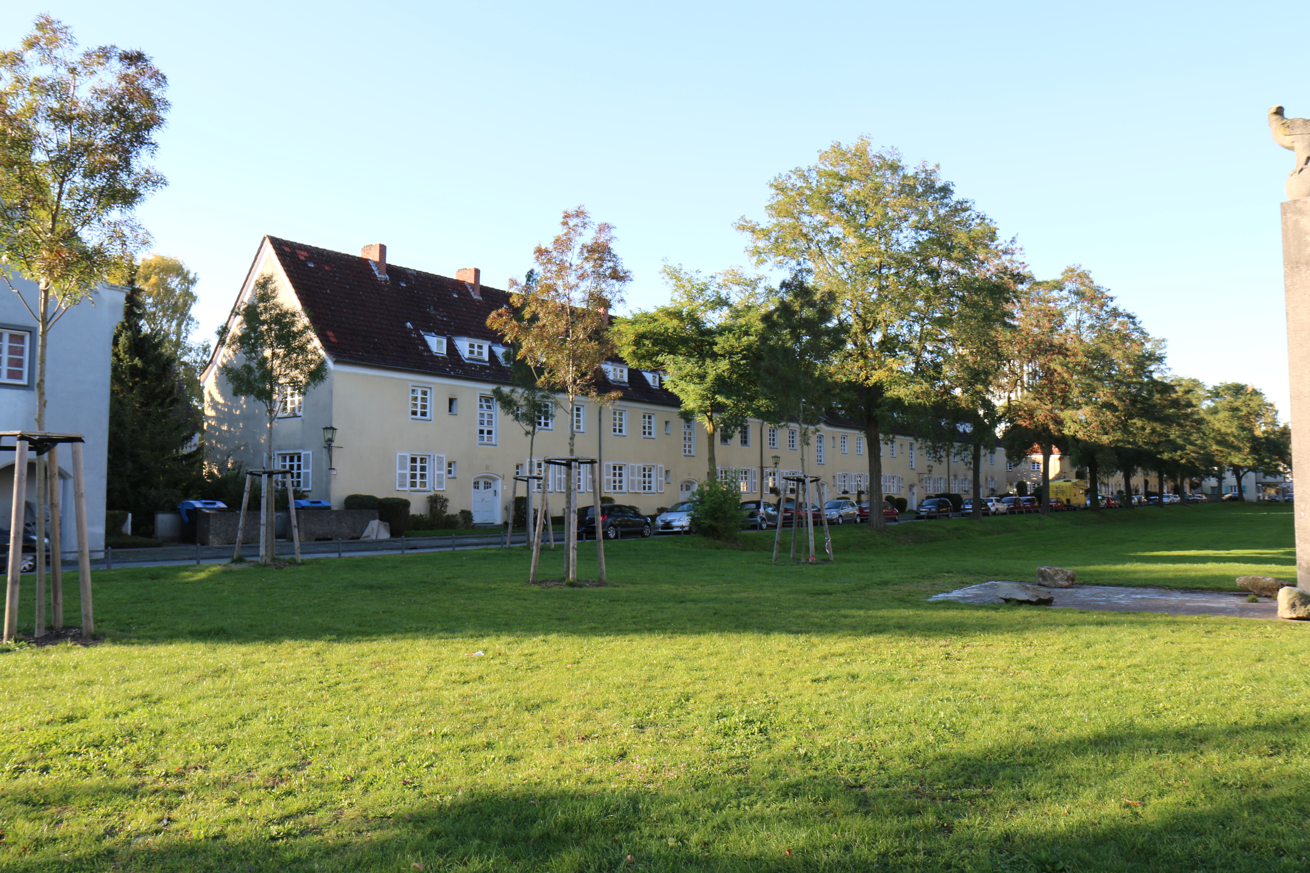 Baudenkmal in Münster (Westf.): Gründer Grund 2-38